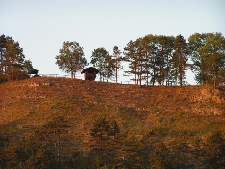 Krayenberg aus der Sicht von Vachdorf